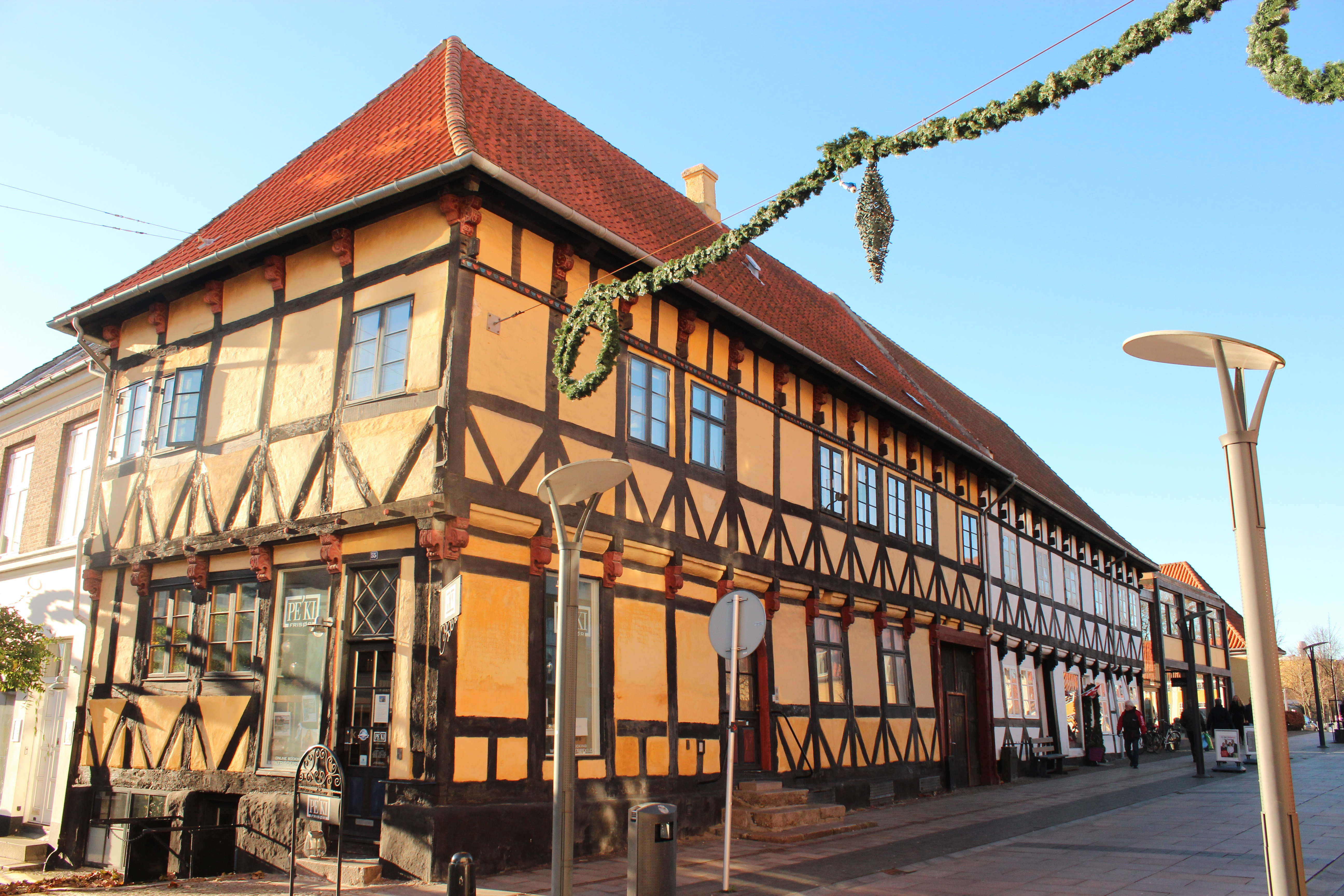 Fredet bindingsværksbygning på gågaden i Kalundborg.